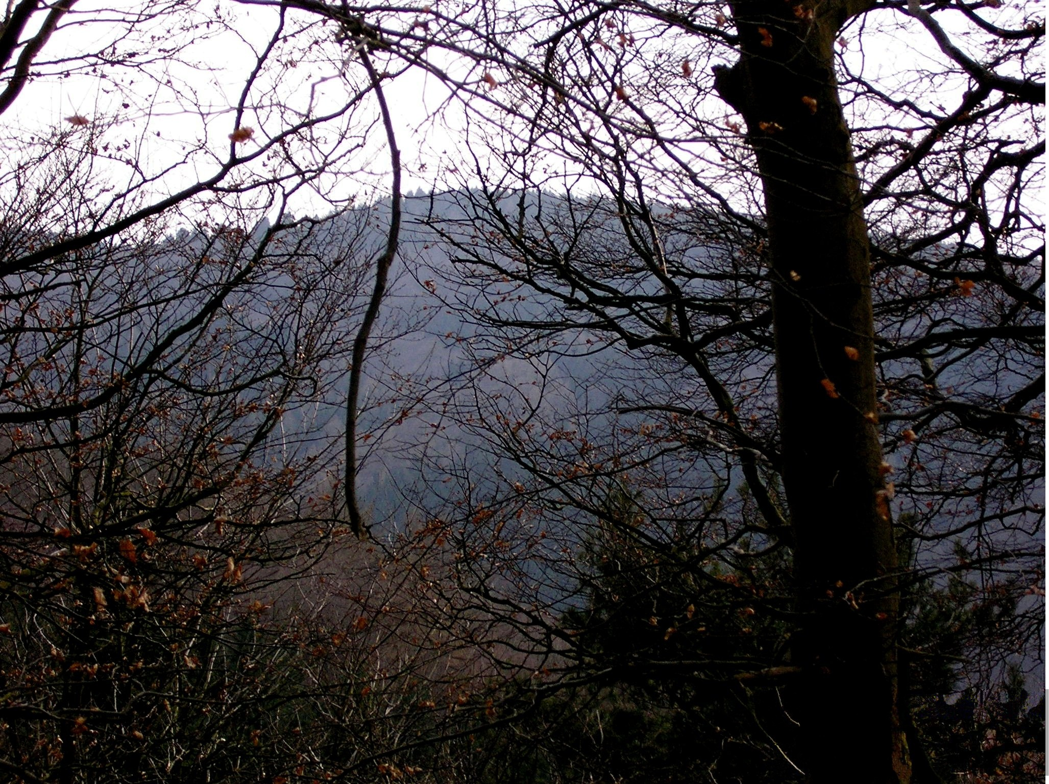 ... Sonstiges: freie Lizenz durch Ersteller ist erteilt